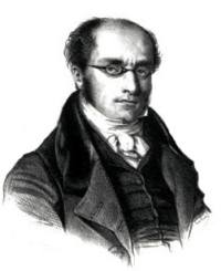 Michel de Bourges (1797-1853), advocat, parlamentaire républicain et amant de George Sand, gravure.